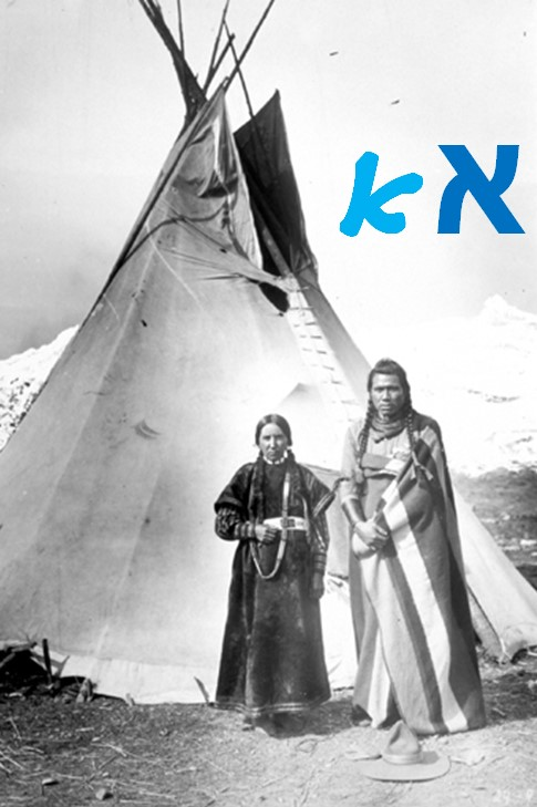 אילוסטרציה לעמוד מספר ללימוד האלפבית לילדים. המקור לתצלום